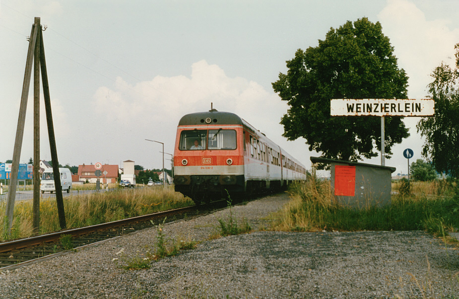 N 7330 von Nürnberg Hbf über Nürnberg-Stein nach Großhabersdorf wurde am 04.07.1986 aus 614 036 + 914 011 + 914 018 + 614 035 gebildet.